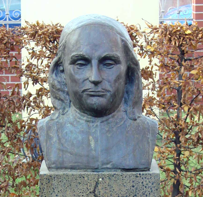 Paul-Gerhardt-Büste am Wittenberger Paul-Gerhardt-Stift der Lutherstadt Wittenberg